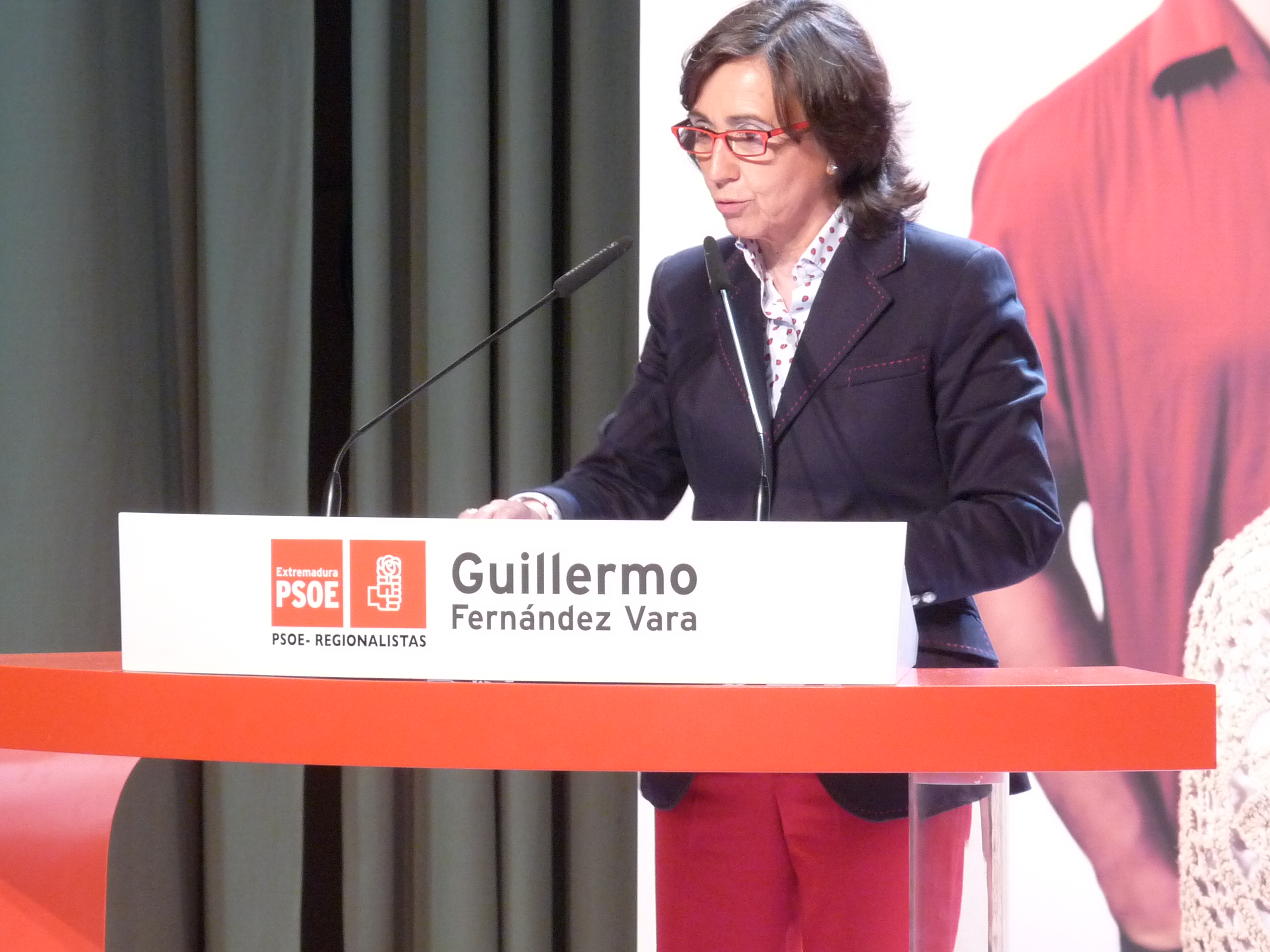 Rosa Aguilar en Zafra